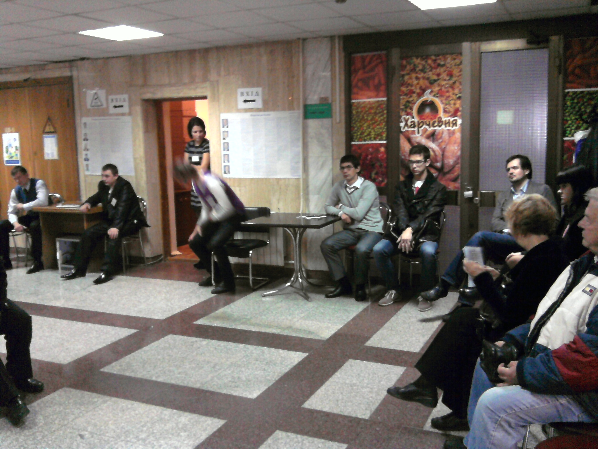 Наблюдатели за парламентскими выборами в Украине 28.10.2012